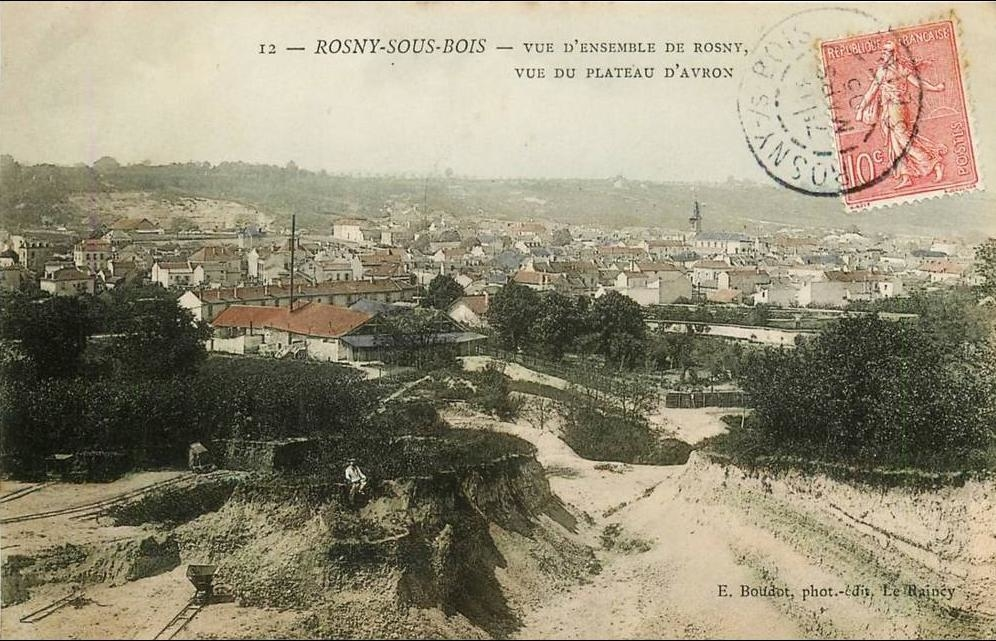 Rosny-sous-Bois: Le plateau d'Avron